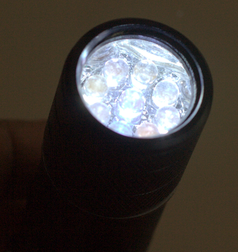 എൽ.ഇ.ഡി ടോർച്ച്